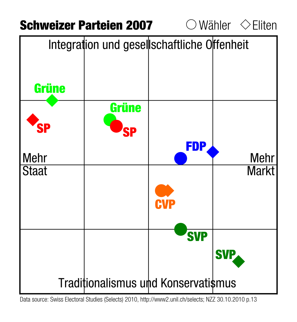 Die politischen Positionen der Wähler und Eliten der grossen Schweizer Parteien (Stand Wahlen 2007). Die Daten entstammen der Forschung von Philipp Leimgruber (University of Bern), Dominik Hangartner (Washington University) und Lucas Leemann (Columbia University), im Rahmen der Swiss Electoral Studies (Selects) der Universität Lausanne, und sind publiziert in Comparing Candidates and Citizens in the Ideological Space, Swiss Political Science Review 16(3) S. 499-531(33). Die grafische Darstellung lehnt sich an die Grafik in der Neuen Zürcher Zeitung vom 30 October 2010, S. 13, an.